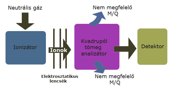 Maradékgáz a.